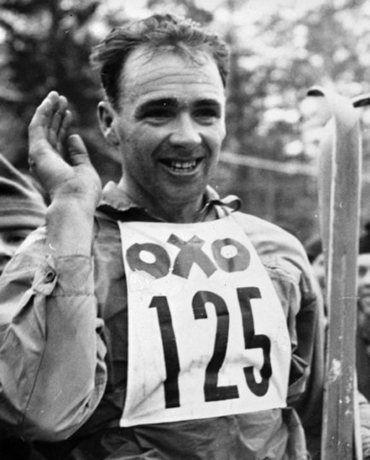 Sverre Stensheim